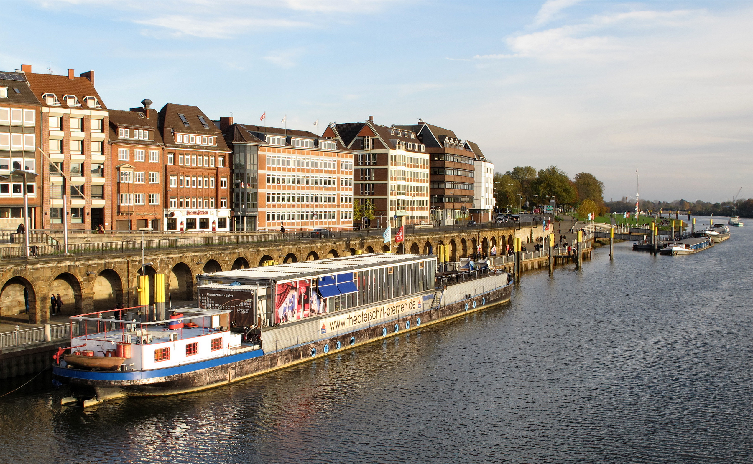 Theaterschiff Bremen, Anleger 4 (Tiefer), Bremen, Stadtteil: Mitte, Ortsteil: Altstadt